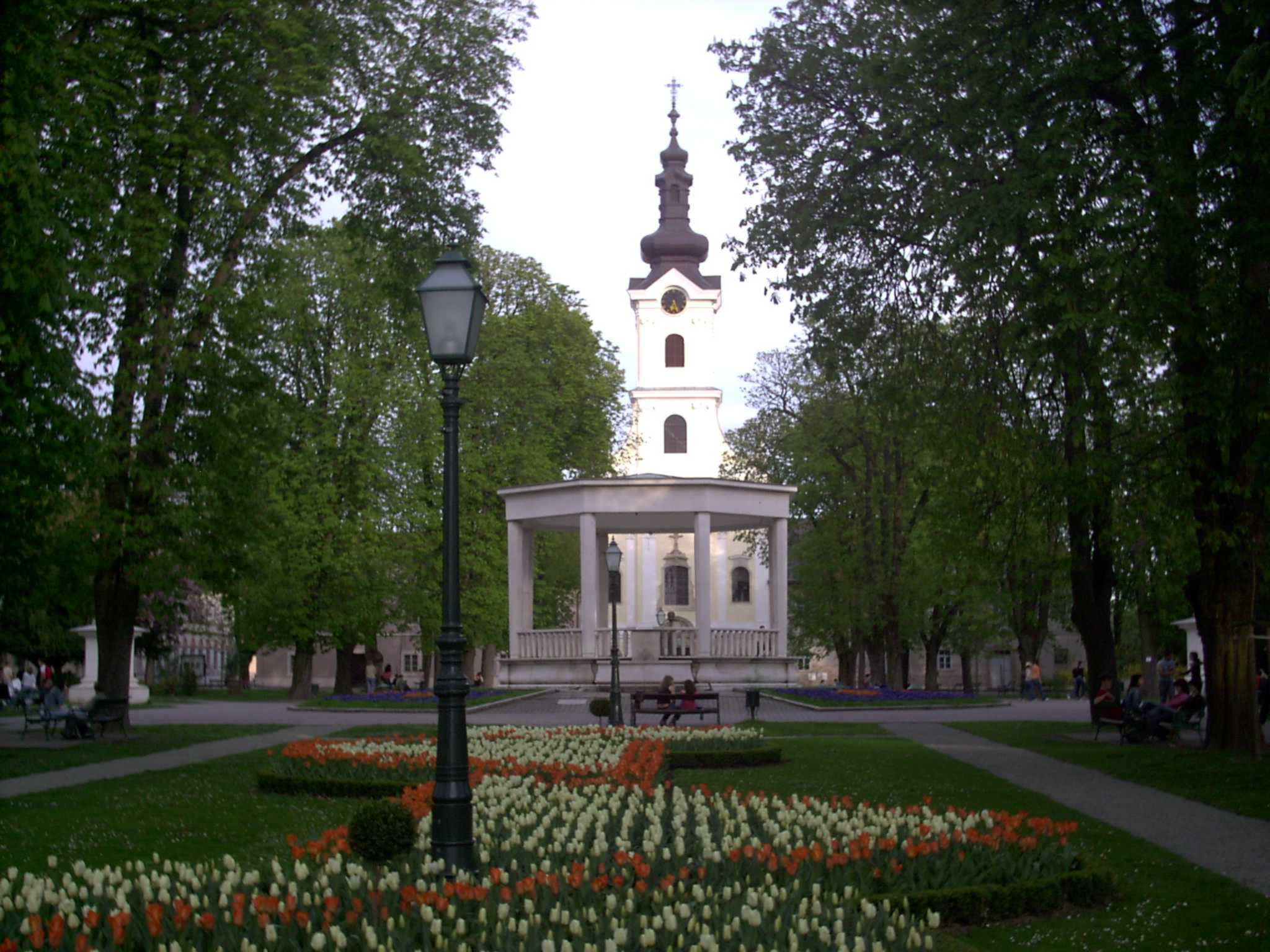 Bjelovar